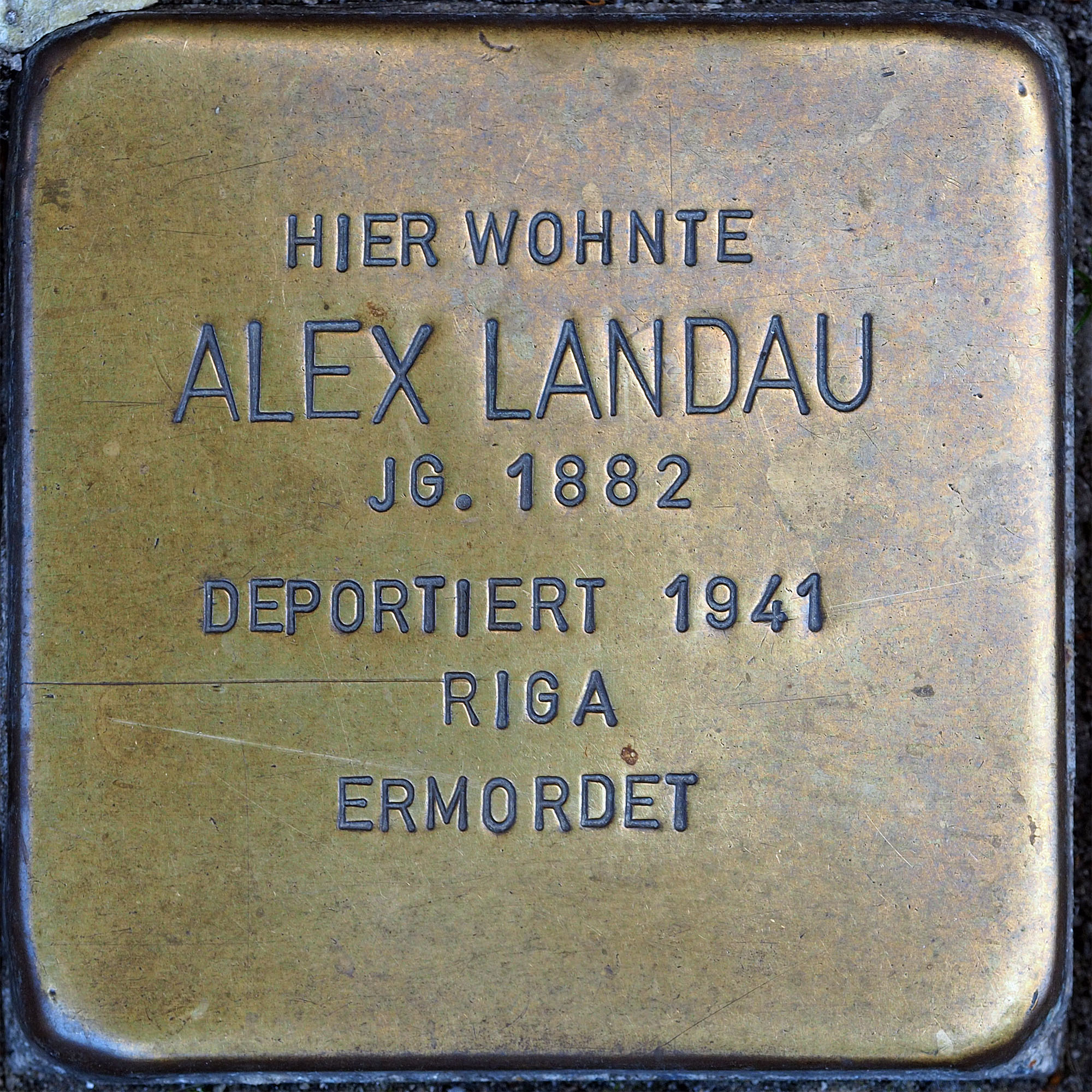 Stolpersteine Wesel: Landau, Alex